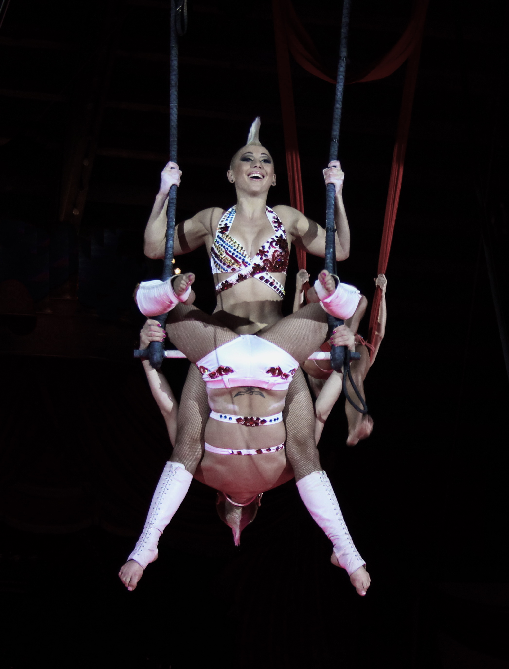 Bingo Truppe aus der Ukraine.